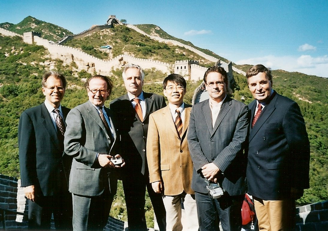 Christian von Holst mit seinen Kollegen Peter-Klaus Schuster, Martin Roth, einem chinesischen Begleiter, Udo Kittelmann und Reinhold Baumstark während einer Studienreise zu chinesischen Museen